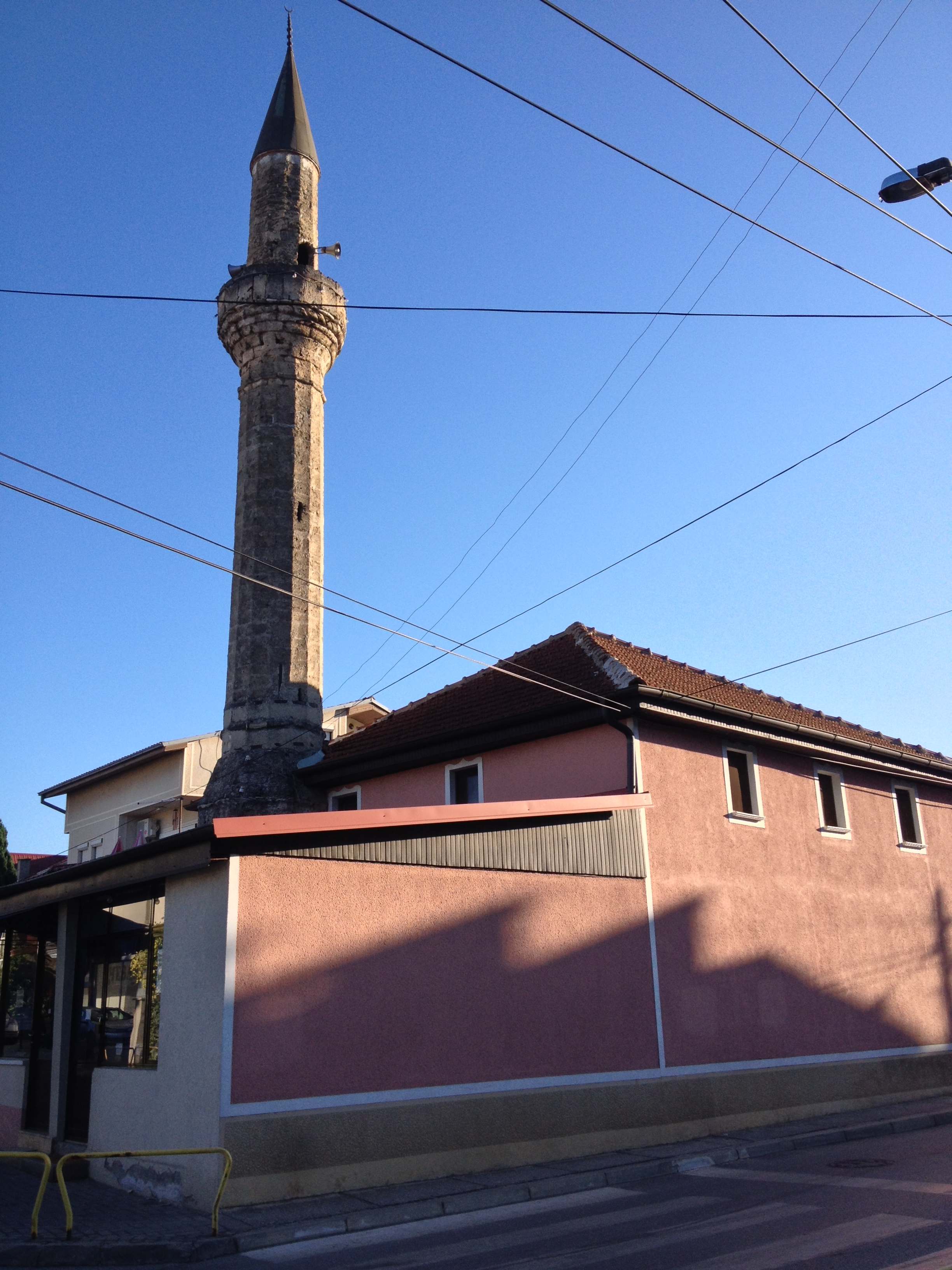 Die Kesan-Moschee in Ohrid, Mazedonien